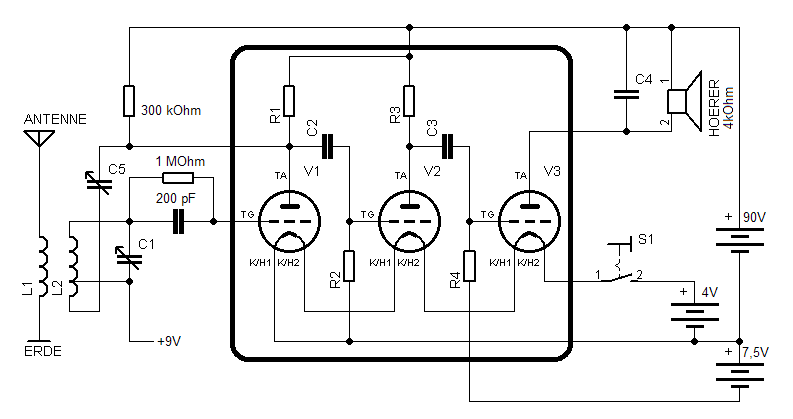 Loewe RO433 Schaltplan